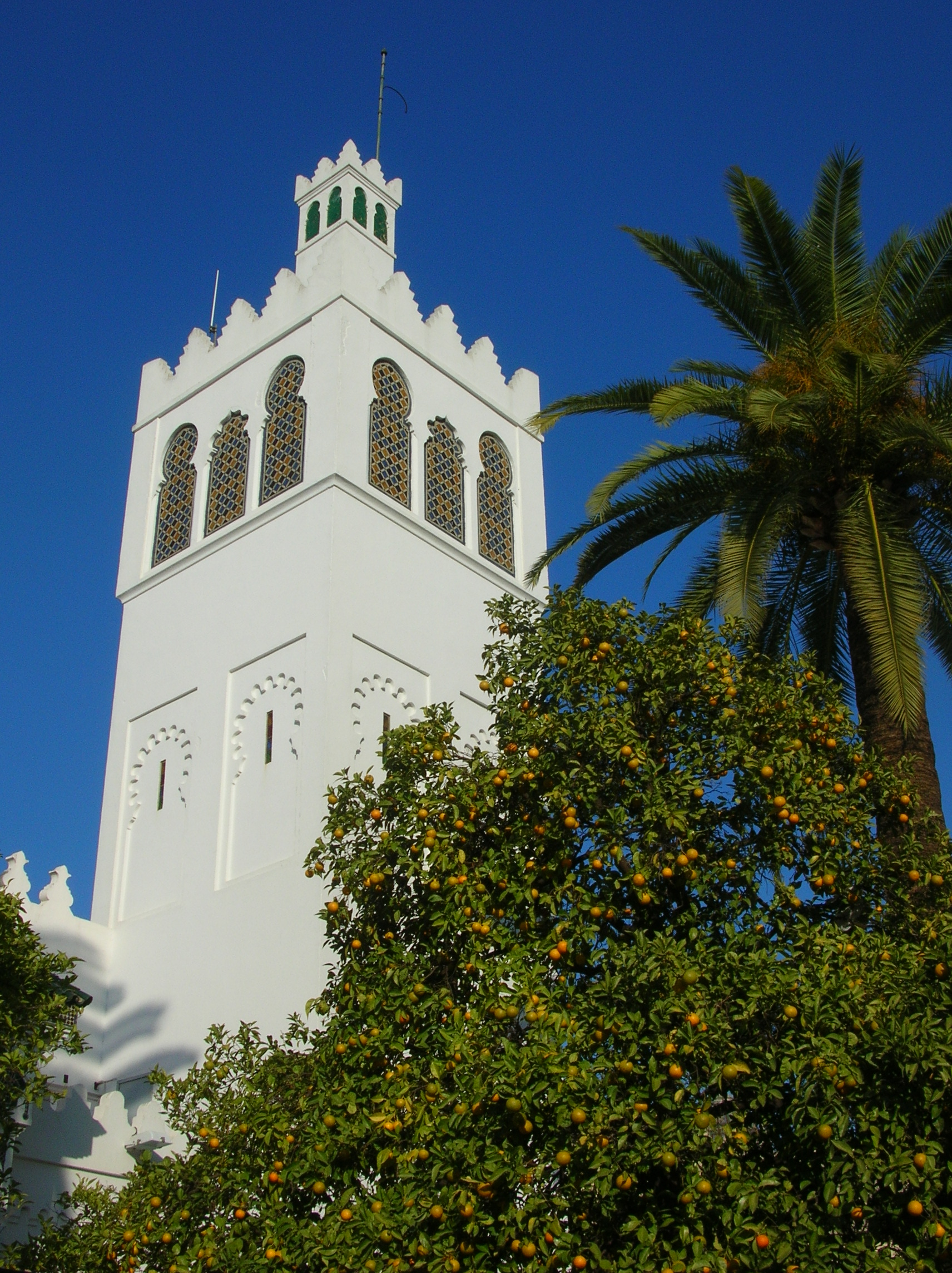 Le pavillon du Maroc de l'expo ibéro-américaine de Séville de 1929